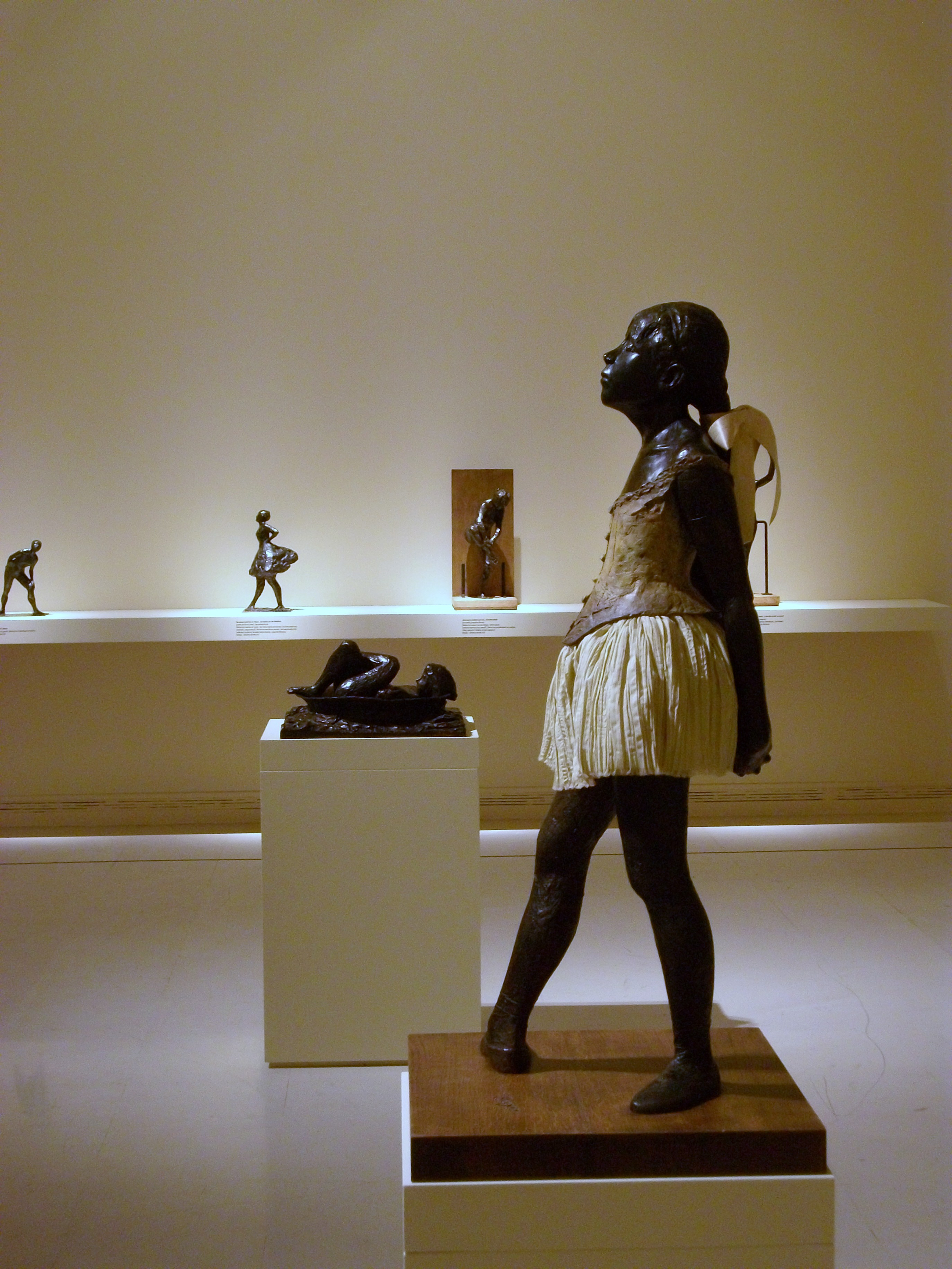 La petita ballarina de catorze anys (La petite danseuse de quatorze ans)